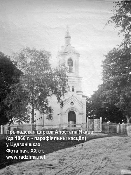 Беларуская (тарашкевіца): Цудзенішкі (Cudzieniški). Касьцёл